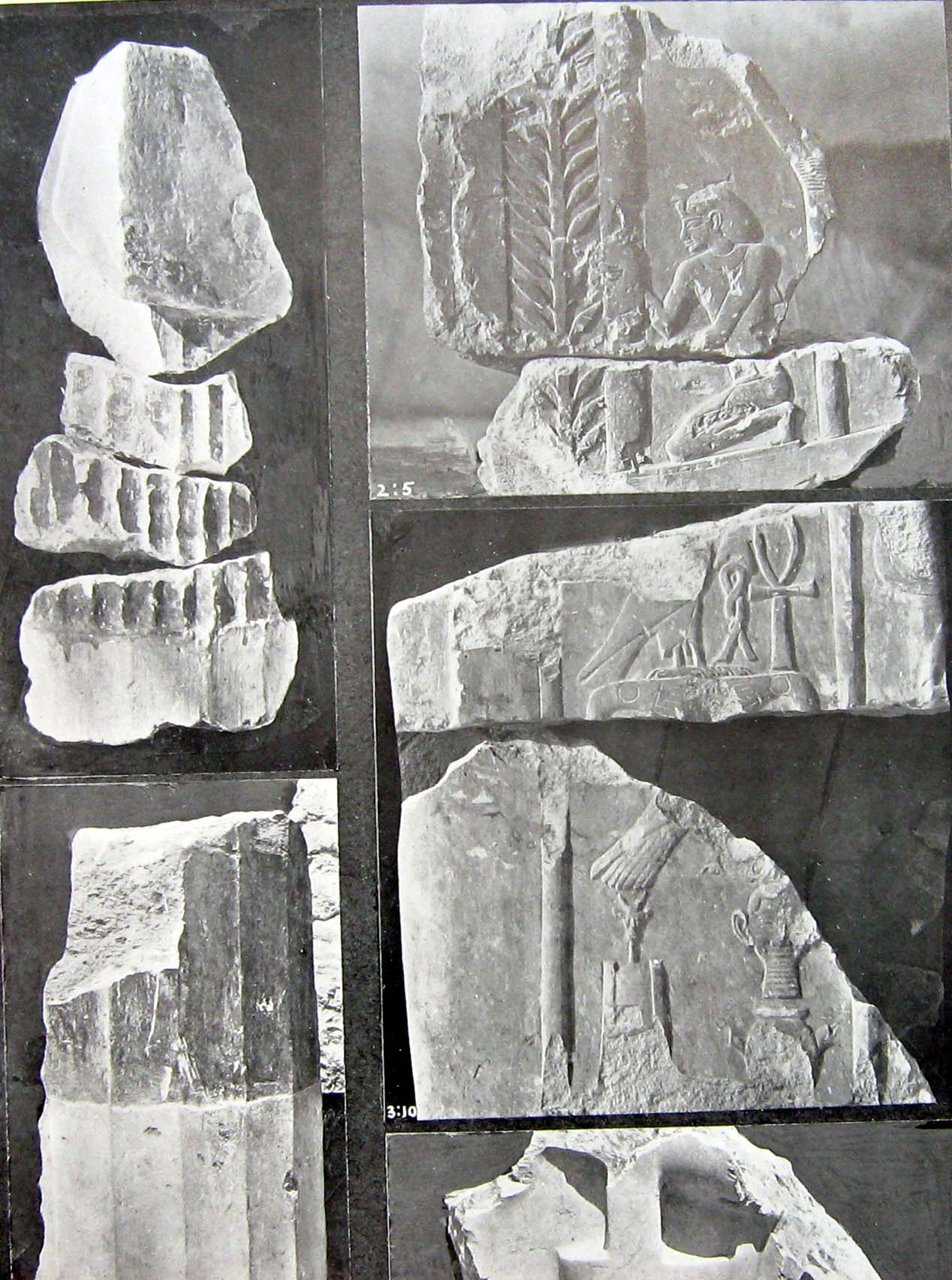 Vestige du labyrinthe de Hawara